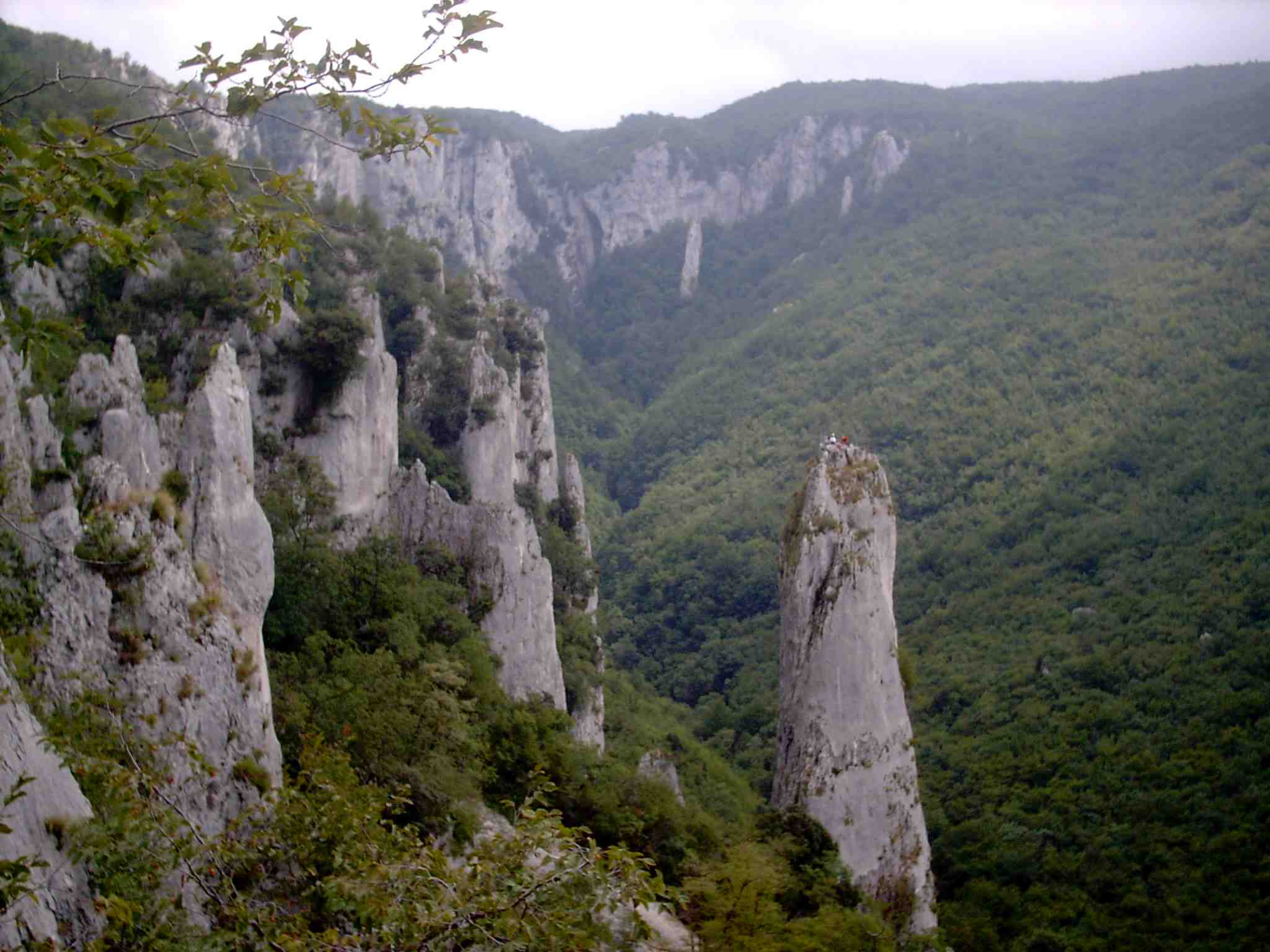 Die Vela Draga im Naturpark Učka bei Rijeka